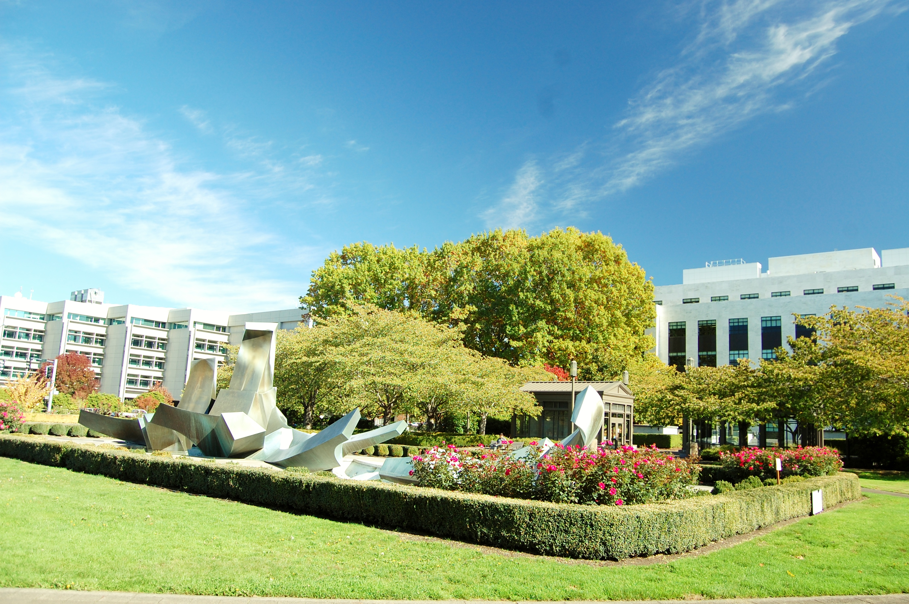 Central Area, Salem, OR, USA